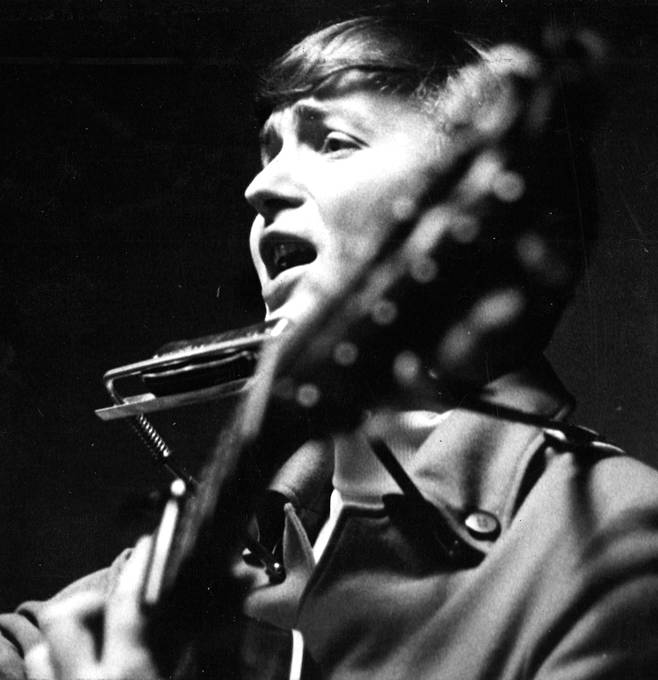 Jukka Kuoppamäki vuonna 1966.